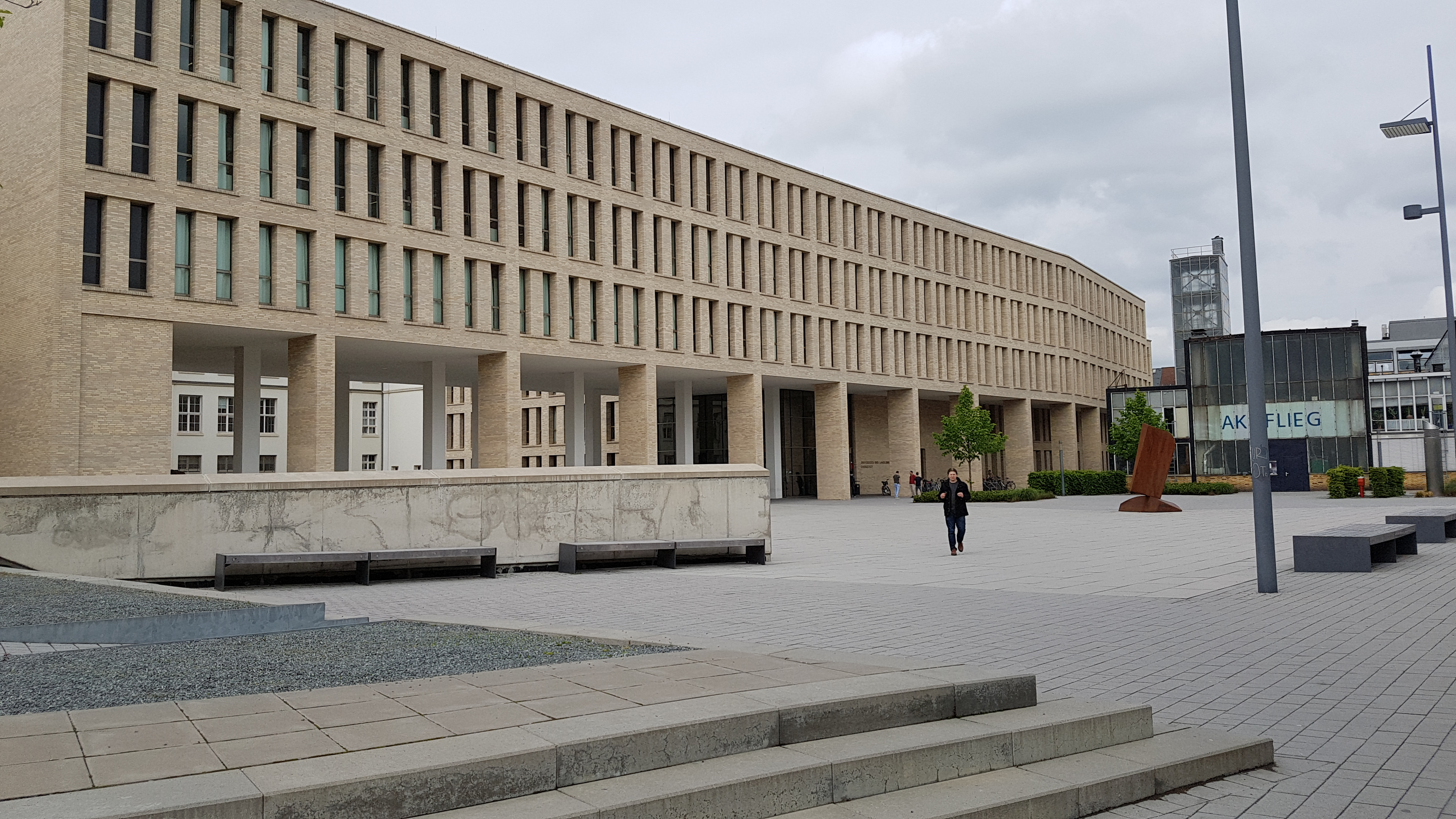 다름슈타트 공과대학교 도서관